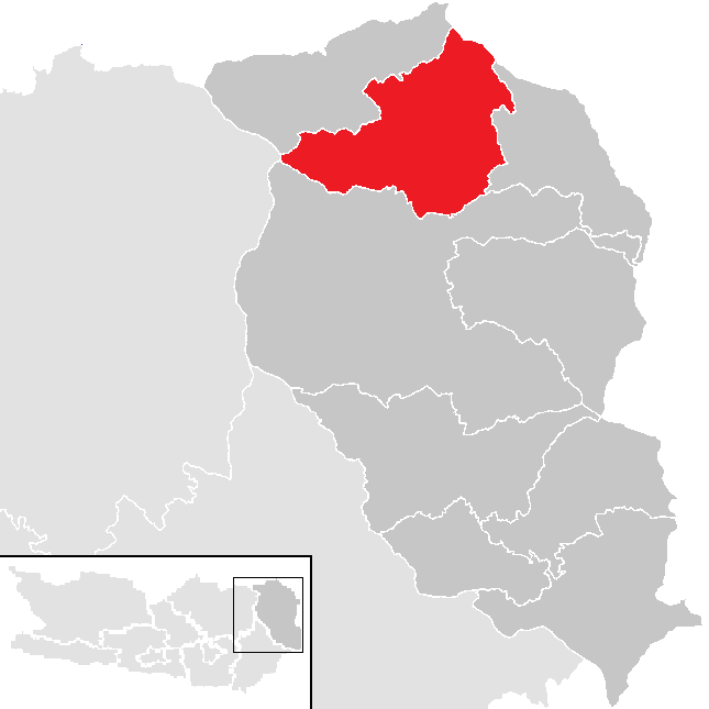 Bezirk Wolfsberg